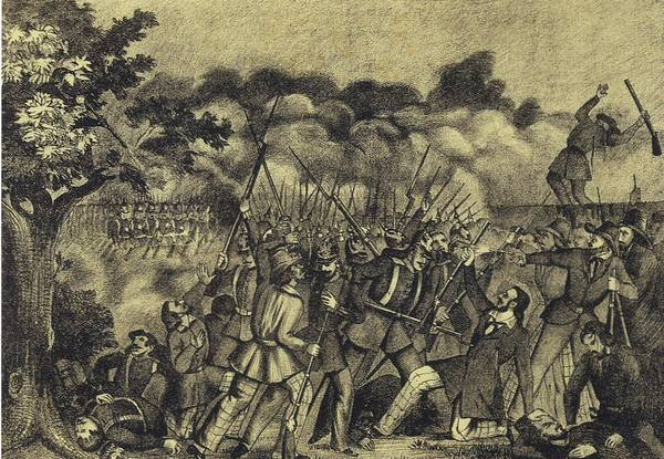 Freischärler im Gefecht bei Kirchheimbolanden (1849); Der Kampf der 17 tapferen Turner und Freischärler bei Kirchheimbolanden am 14. Juni 1849; Lithographie nach Augenzeugenberichten; publiziert 1880 im Verlage Paul Stumpf, Mainz